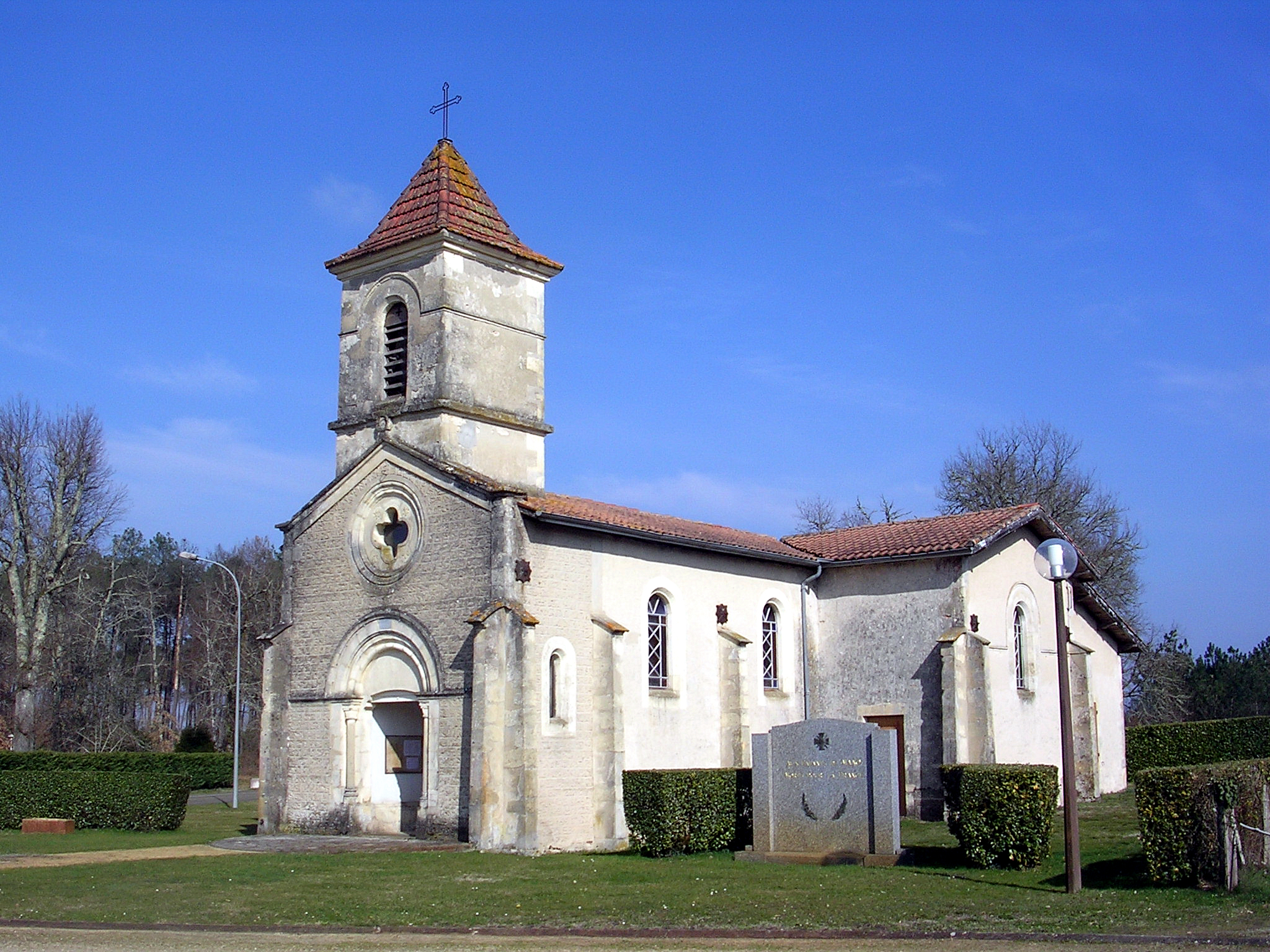 Eglise de Mano, dans le département français des Landes